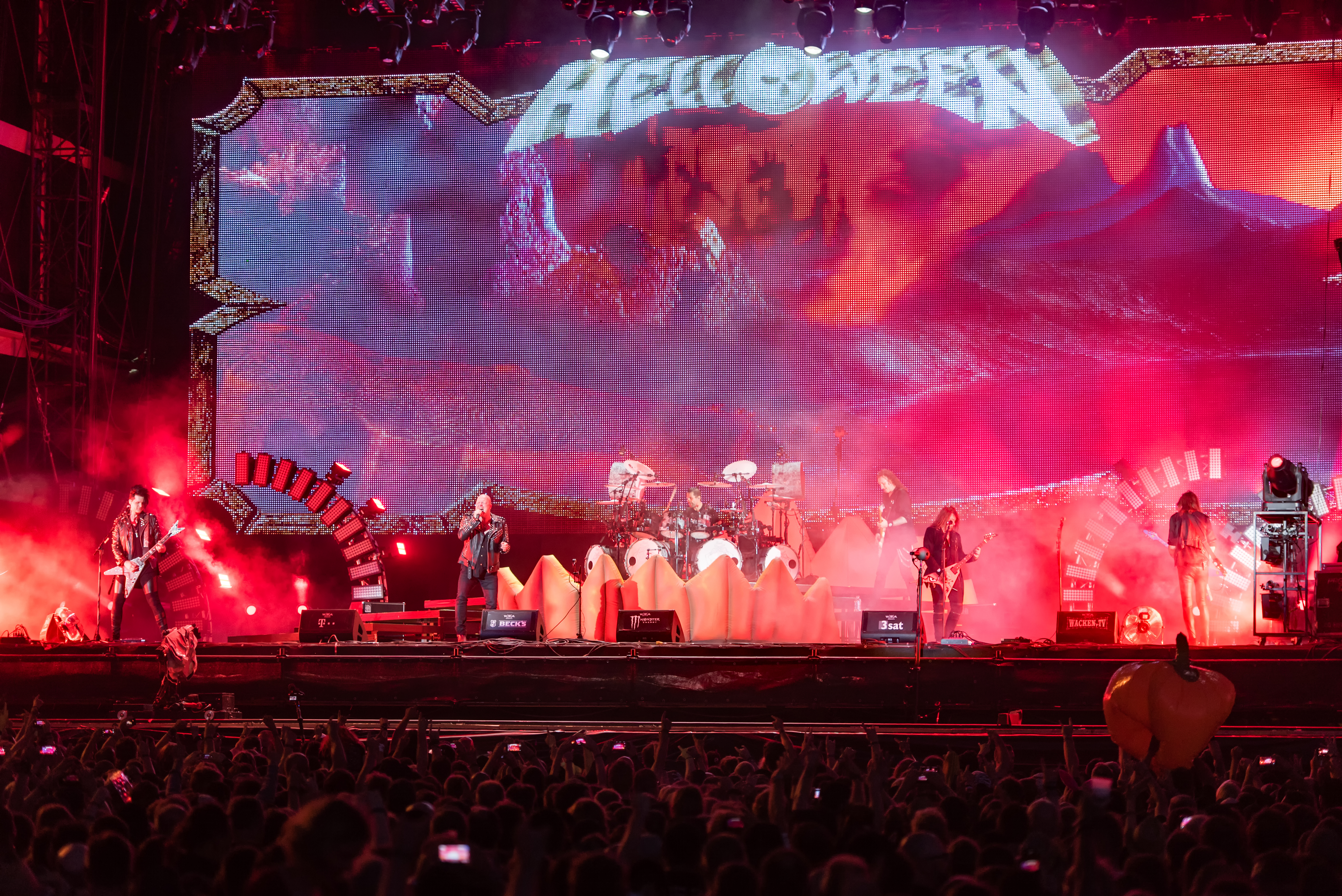 Helloween - Pumpkins United beim Wacken Open Air 2018